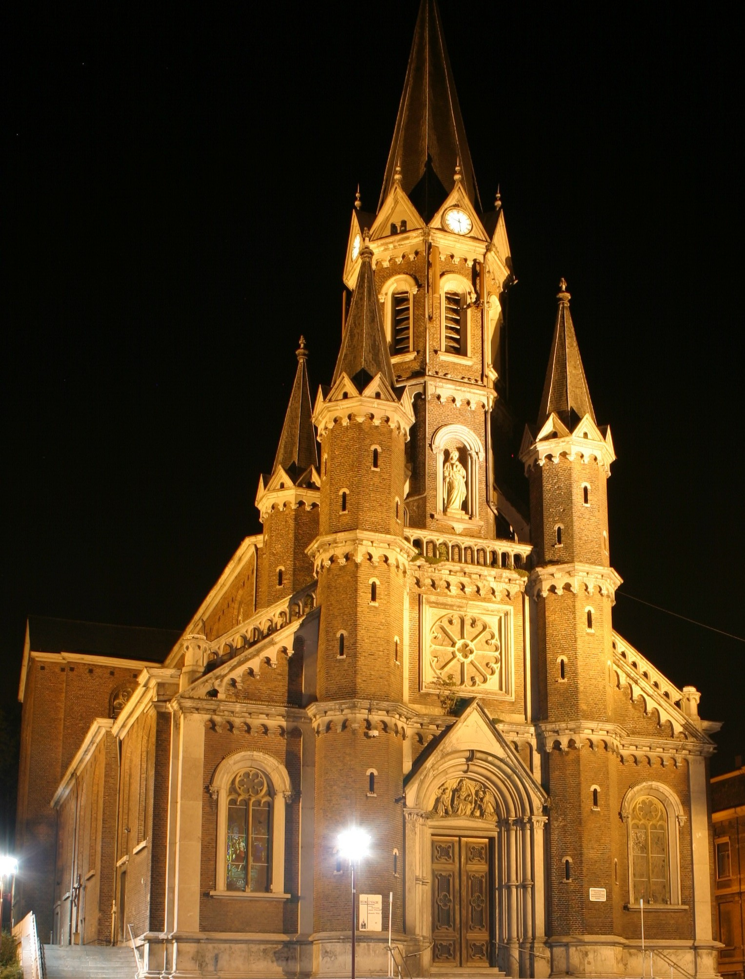 Kierch vun Dison.